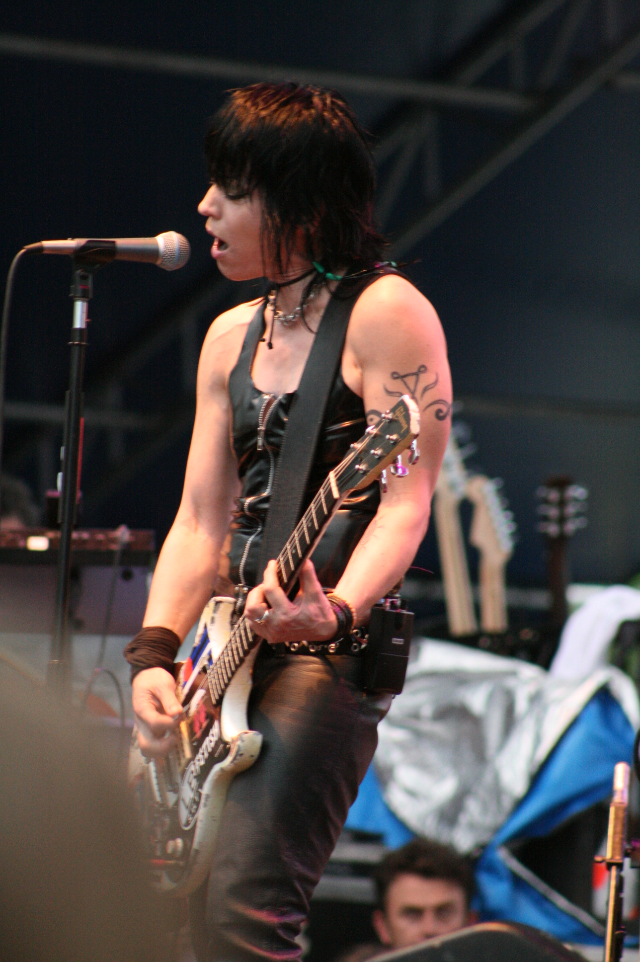 Joan Jett